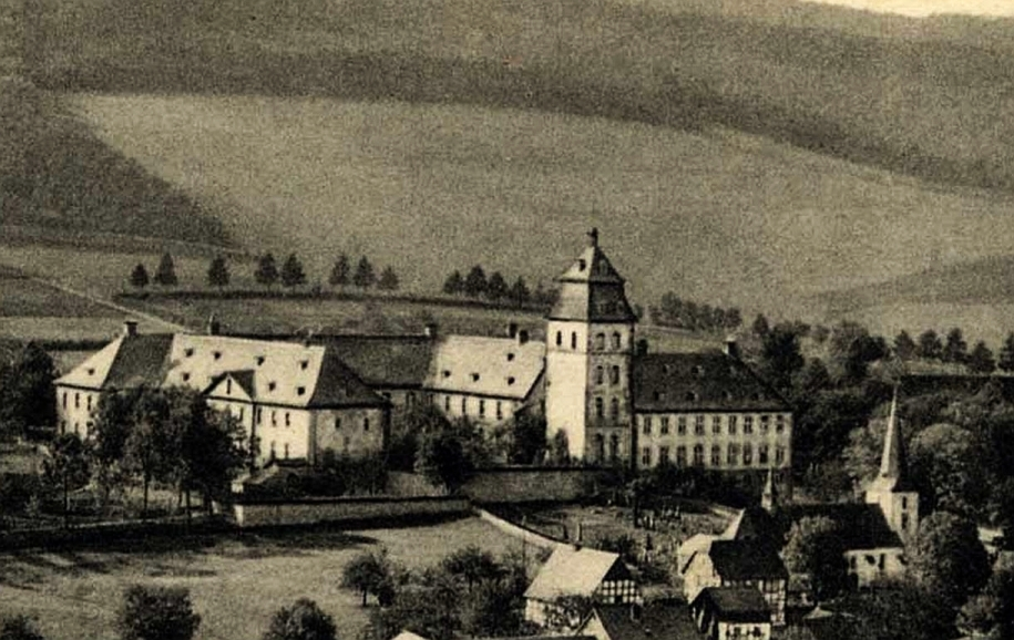 Kloster Grafschaft(Germany)